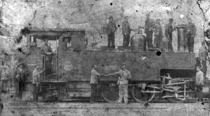 Locomotora Nº 24 “El Esla“. Fotografiada cerca de Cistierna por Tiburcio Huertes, fotógrafo de Cabezón de la Sal.